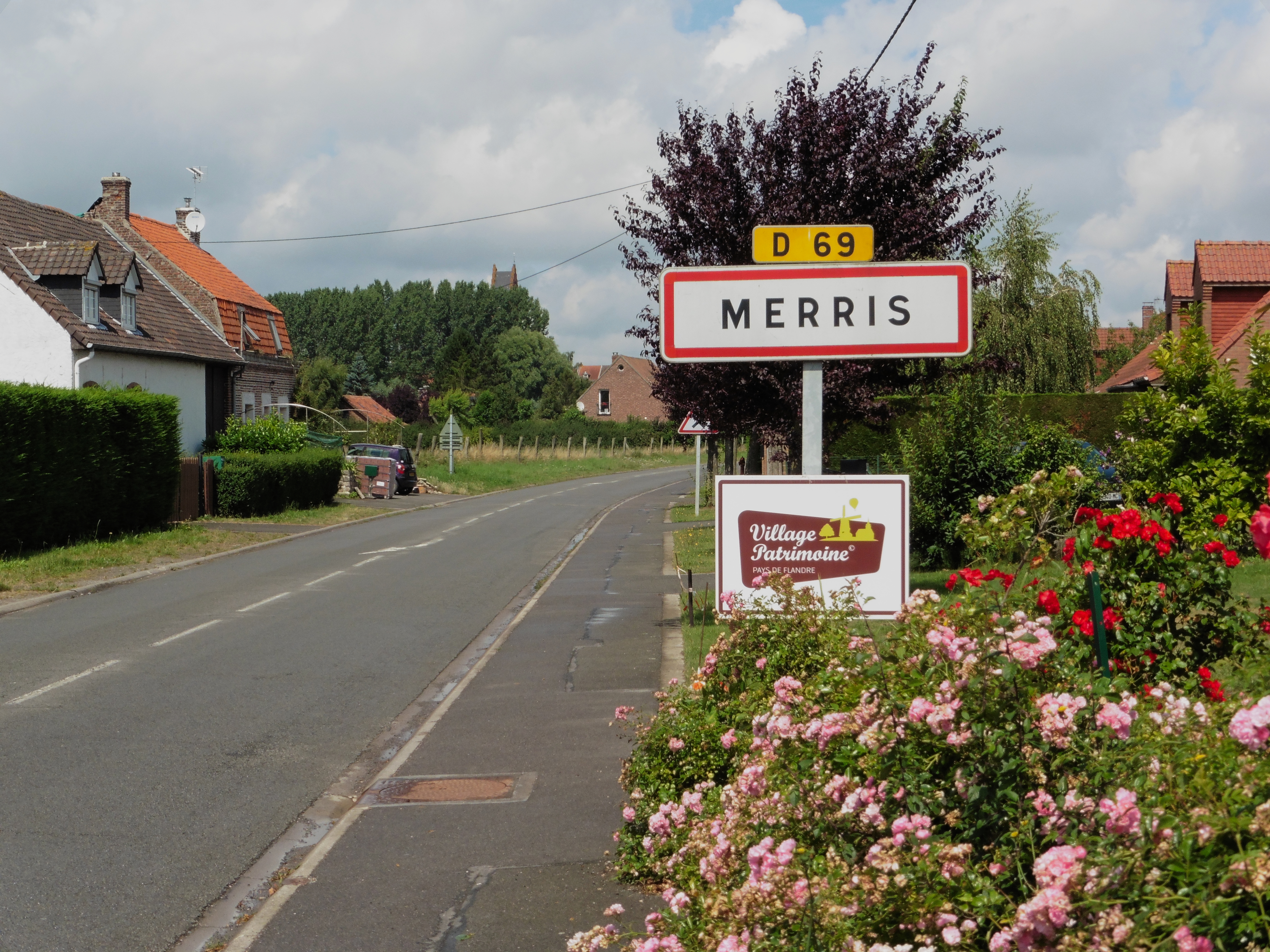 Panneau de la ville de Merris, Nord.- (Nord-Pas-de-Calais).- France.